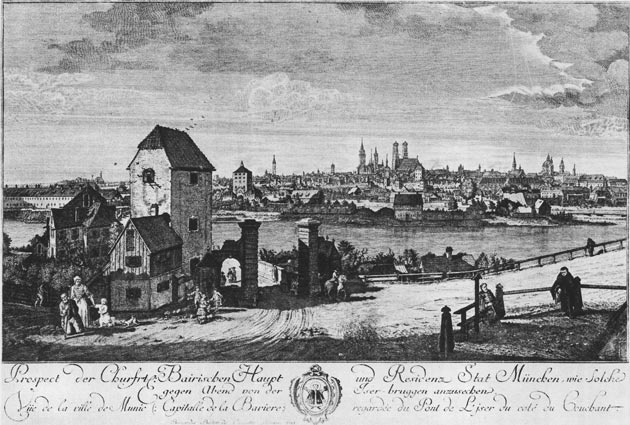 Stadtansicht mit dem Brunnhaus am Isarberg und dem Auertor.